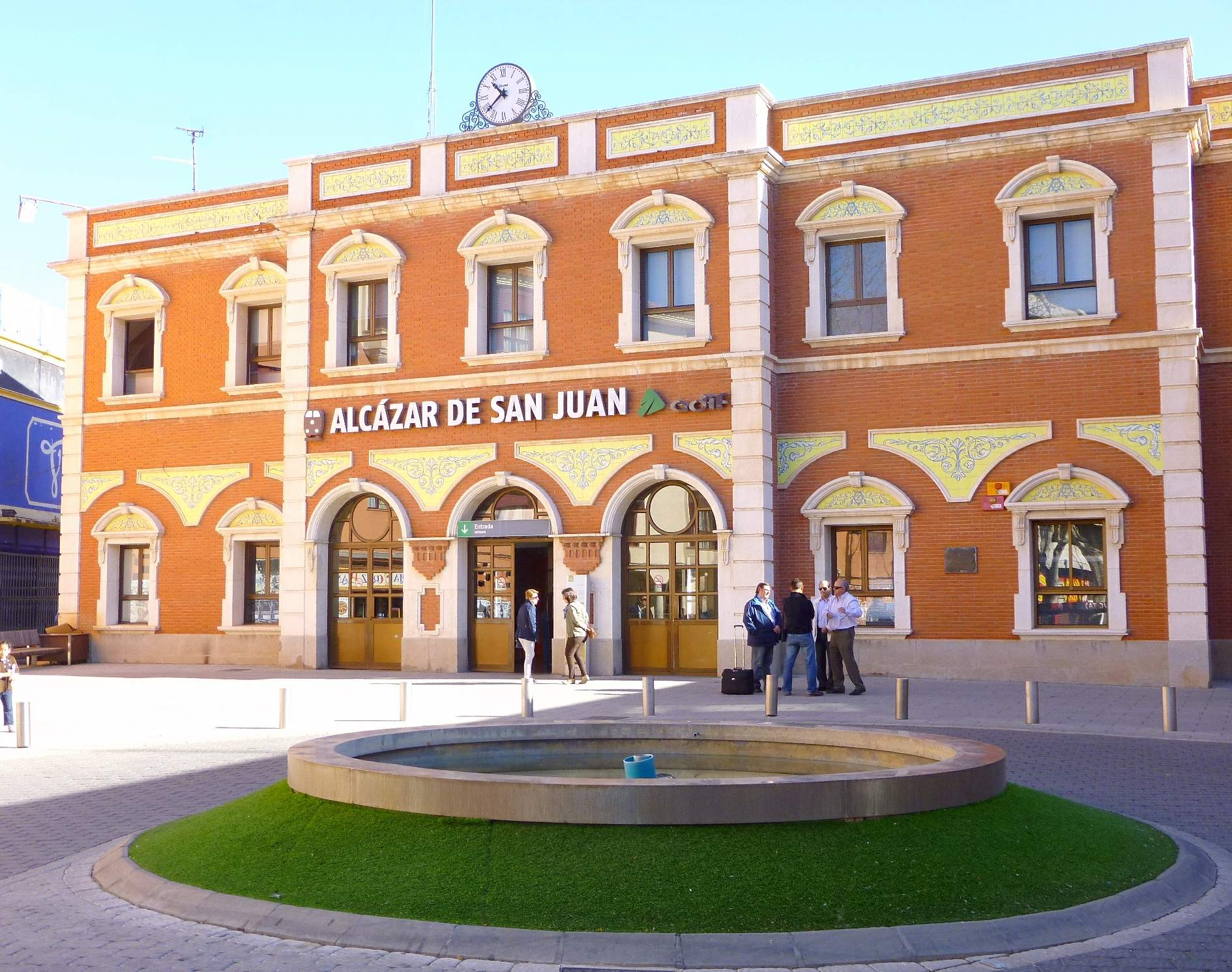 Estación de ADIF en Alcázar de San Juan (Ciudad Real)